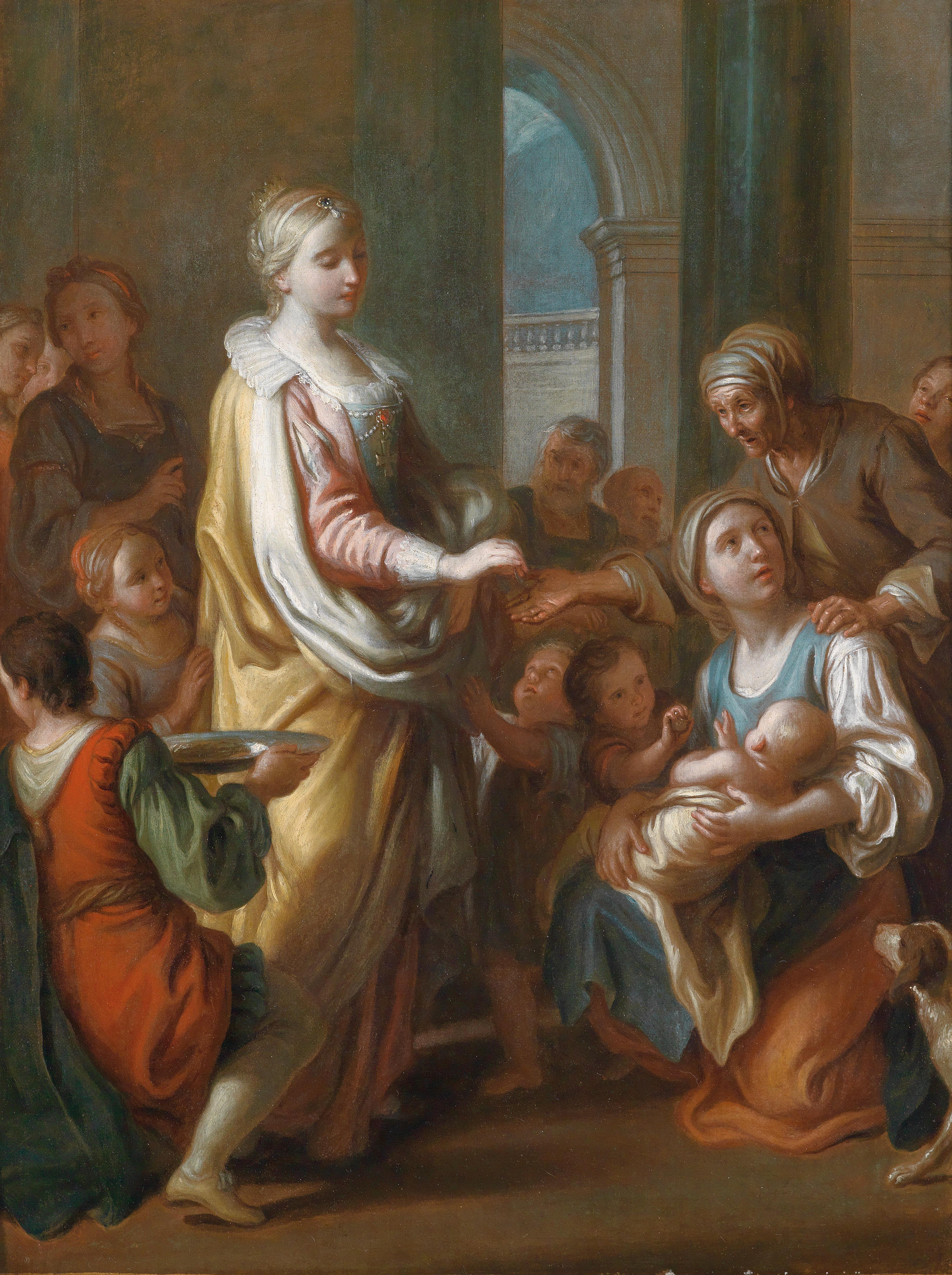 Die Heilige Elisabeth verteilt Almosen, Öl auf Leinwand, 50 x 35,5 cm